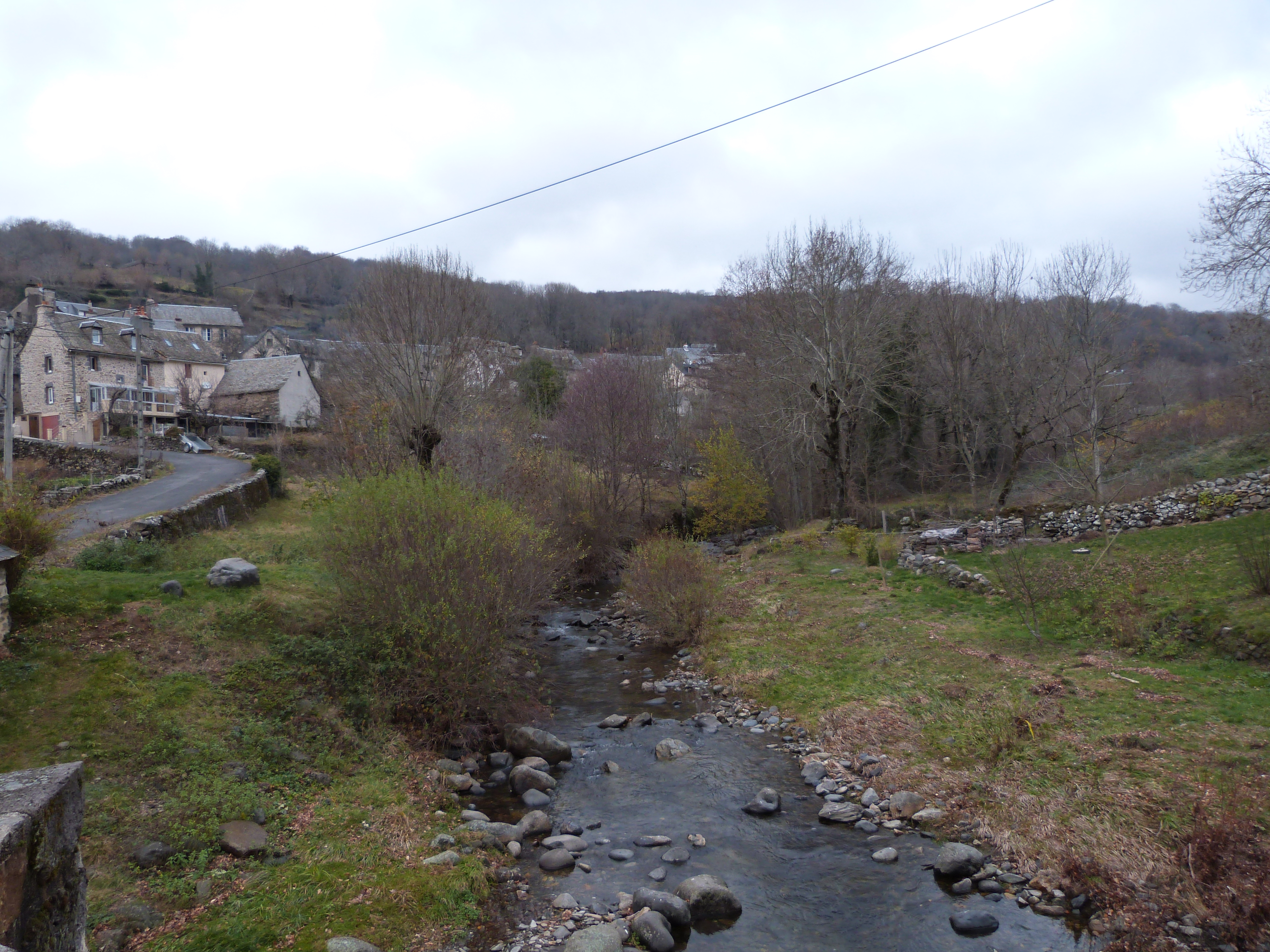 La rivière La Boralde près du Pont des Pèlerins